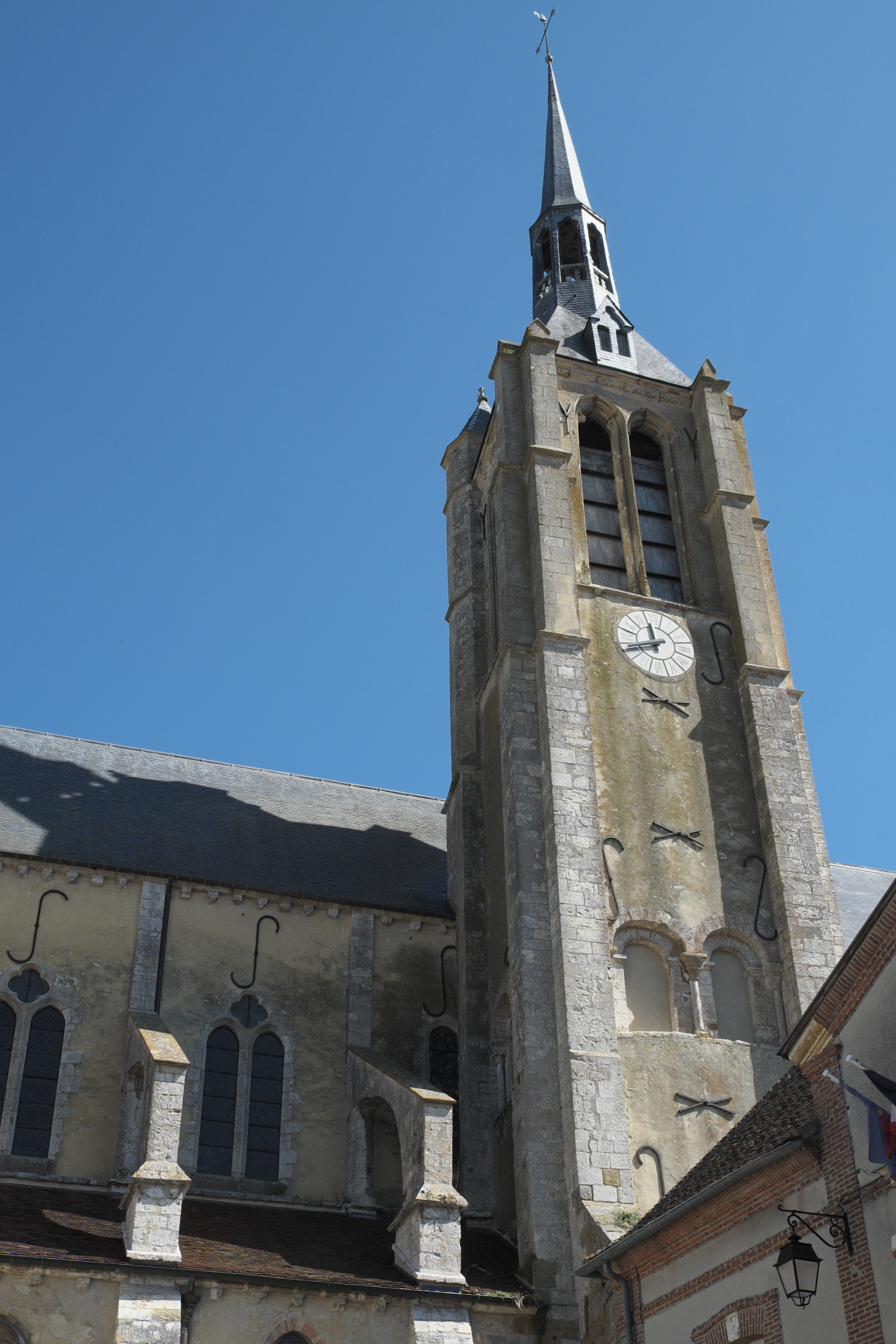 Katholische Kirche Notre-Dame-de-la-Nativité (Mariä Geburt) in Donnemarie-Dontilly im Département Seine-et-Marne (Île-de-France/Frankreich), Glockenturm